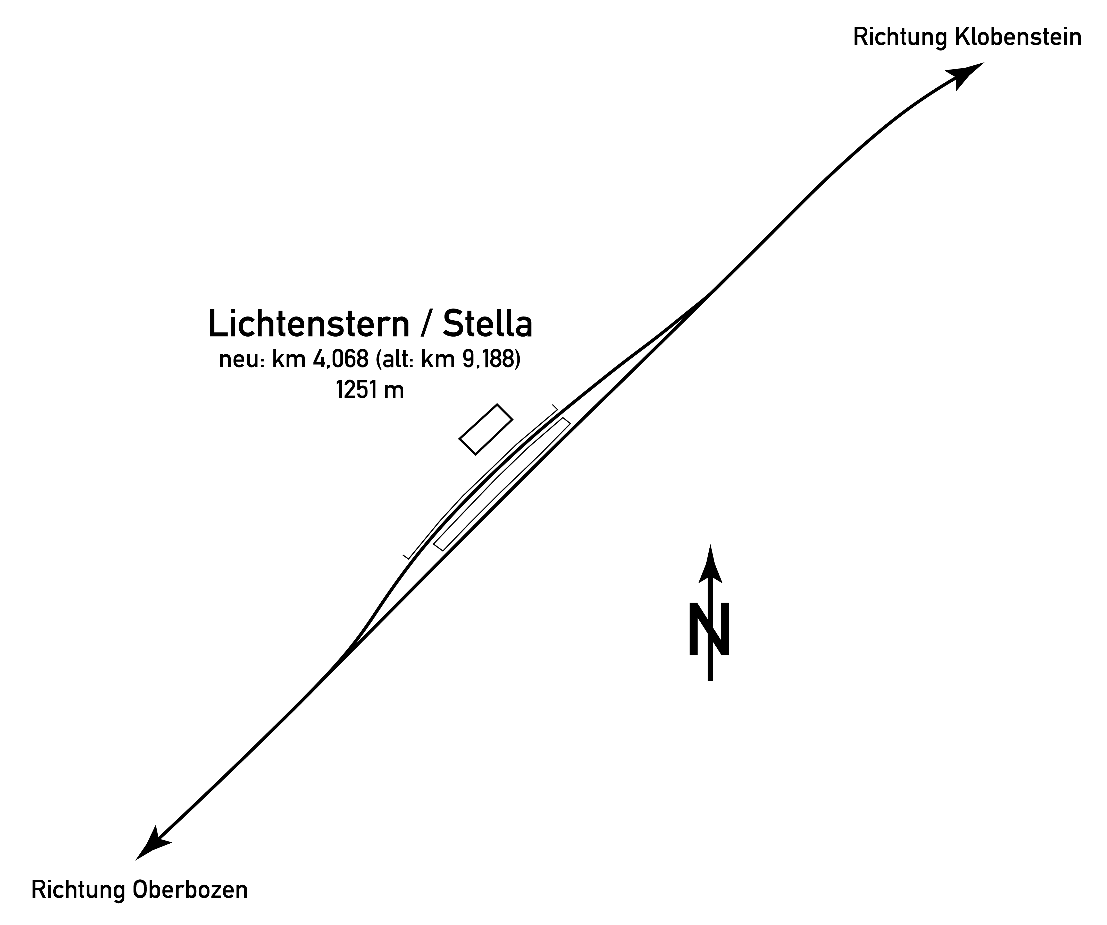 Gleisplan der Haltestelle Lichtenstern / Stella der Rittner Bahn